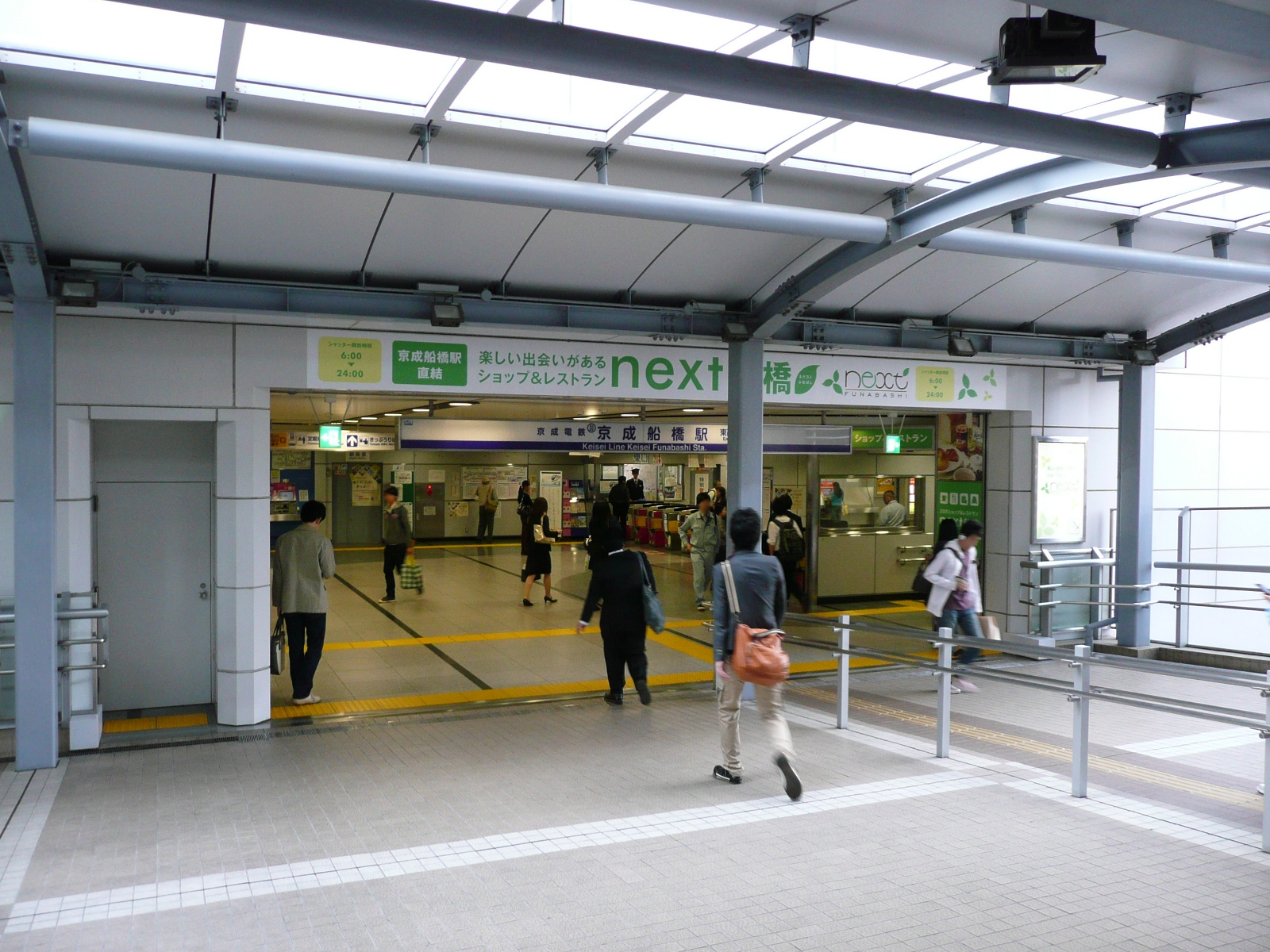 京成船橋駅船橋フェイスビル直結の入口